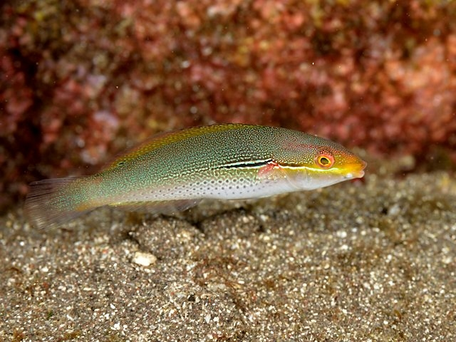 カミナリベラ Stethojulis interrupta terina